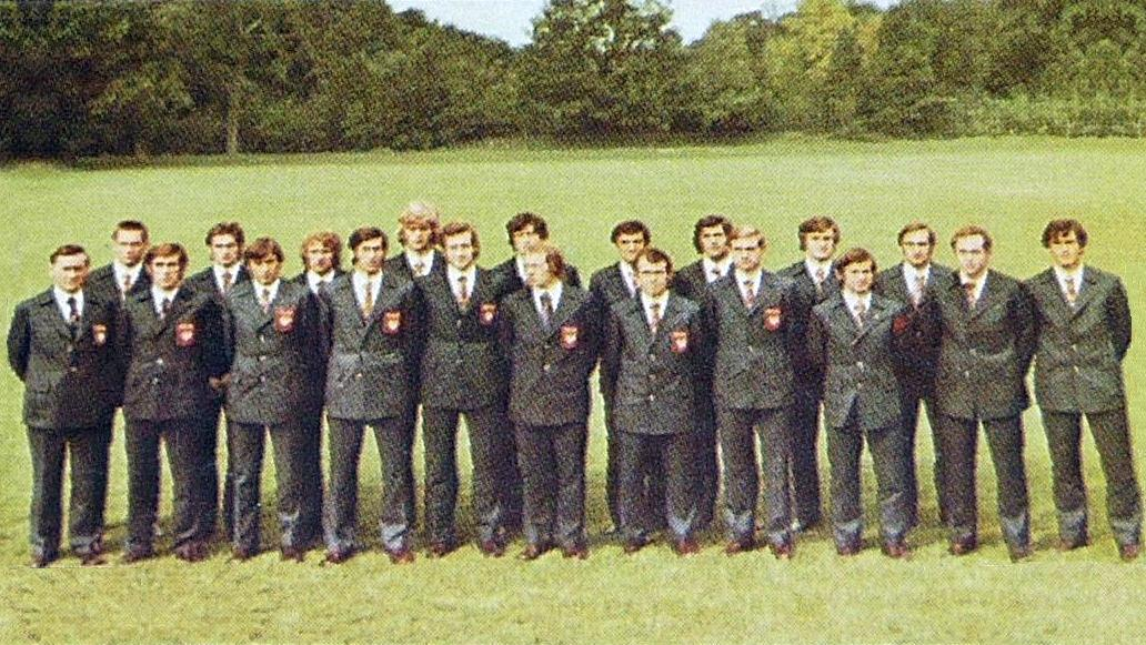 Équipe de Pologne olympique de football, vice-championne olympique1976, 'Montreal 76', Panini figurina n°201.